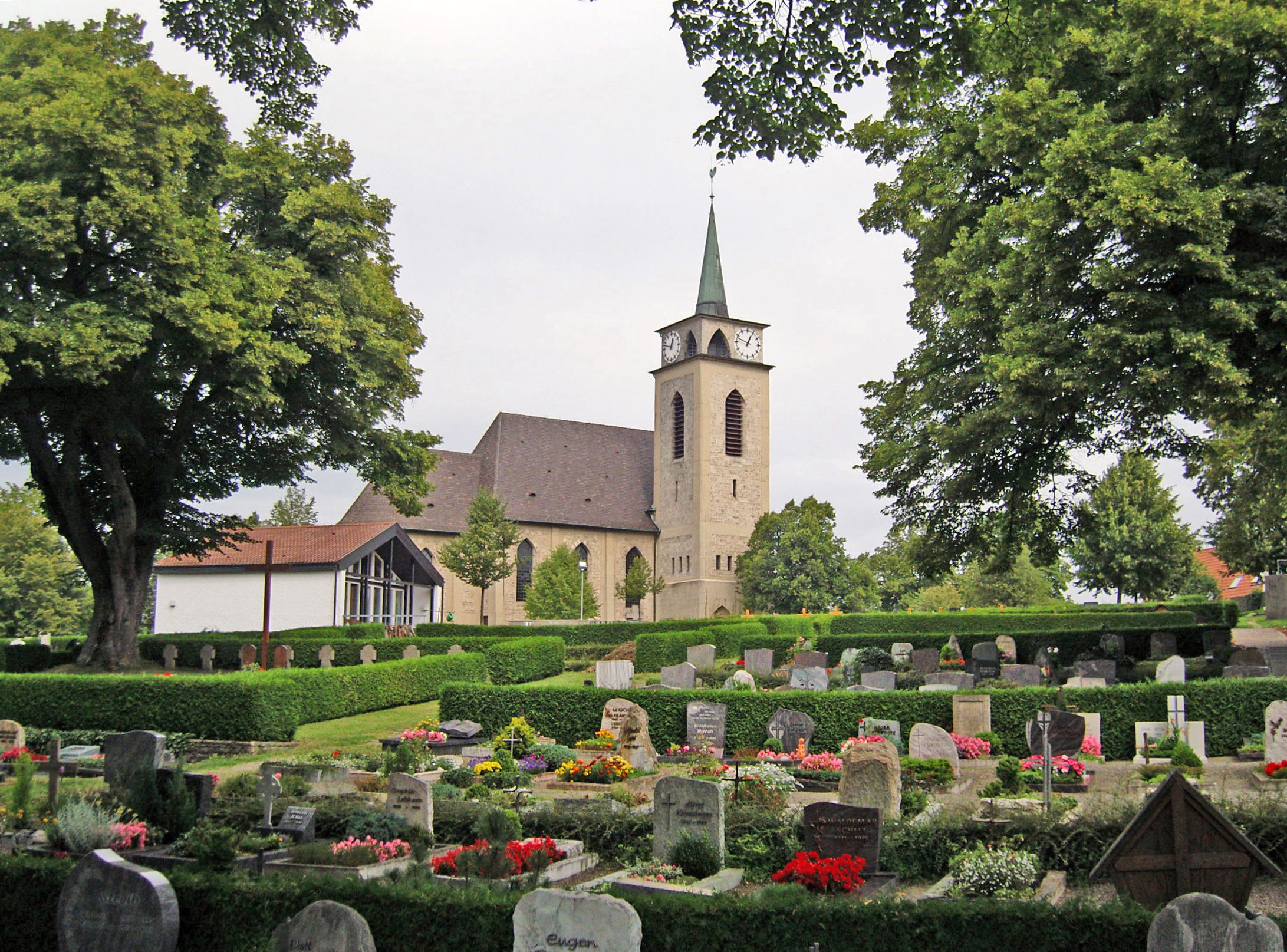 Ev. Kirche von Bitz mit Friedhof